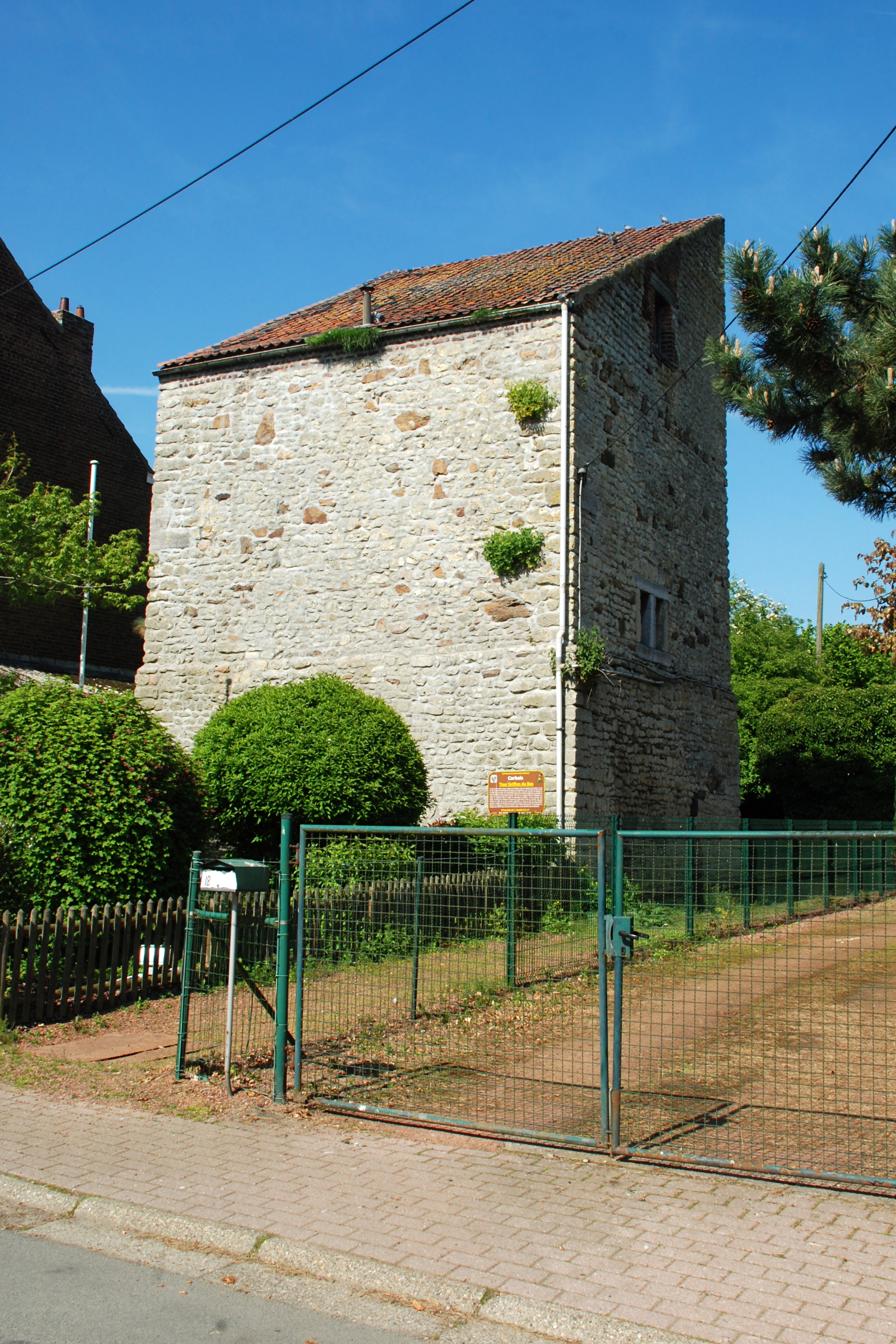 Belgique - Brabant wallon - Mont-Saint-Guibert - Corbais - Tour Griffon du Bois (donjon de Corbais, 13e siècle)